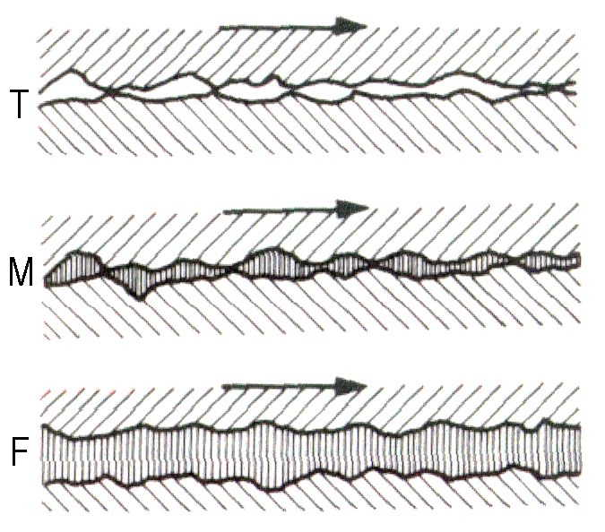 Arten von Reibung im Spalt eines Gleitlagers: T Trocken-, M Misch-, F Flüssigkeits-Reibung